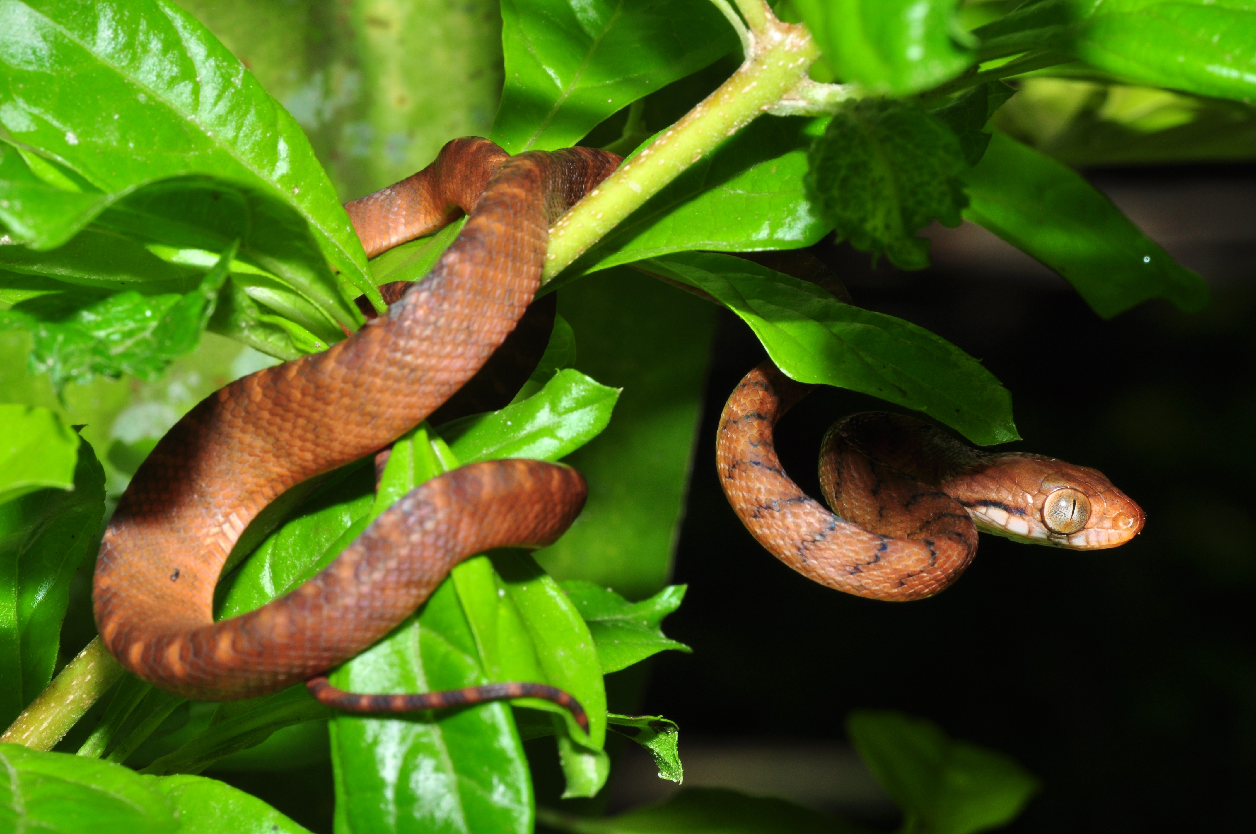 Bogani Nani Wartabone National Park Коричневая бойга